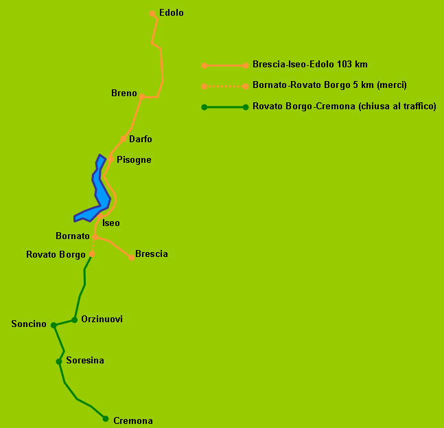 Rete SNFT (autore marco lambruschi)